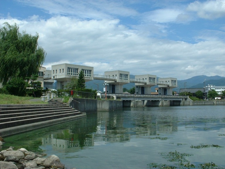 Kamakuchi (or Kamaguchi, unknown) Suimon, Suwa Lake-Tenryu River, Okaya, Nagano.諏訪湖（右）から天竜川に流出する釜口水門